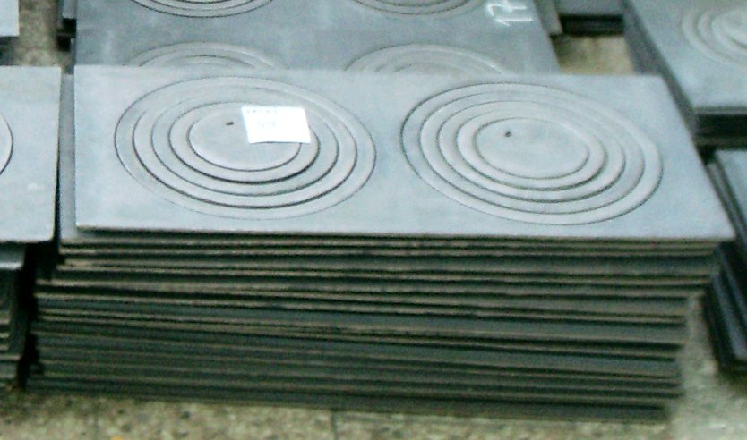 Żeliwna płyta kuchenna z fajerkami